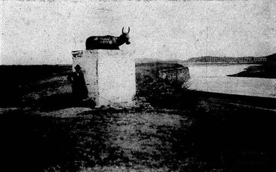 北京石景山庞村镇水牛